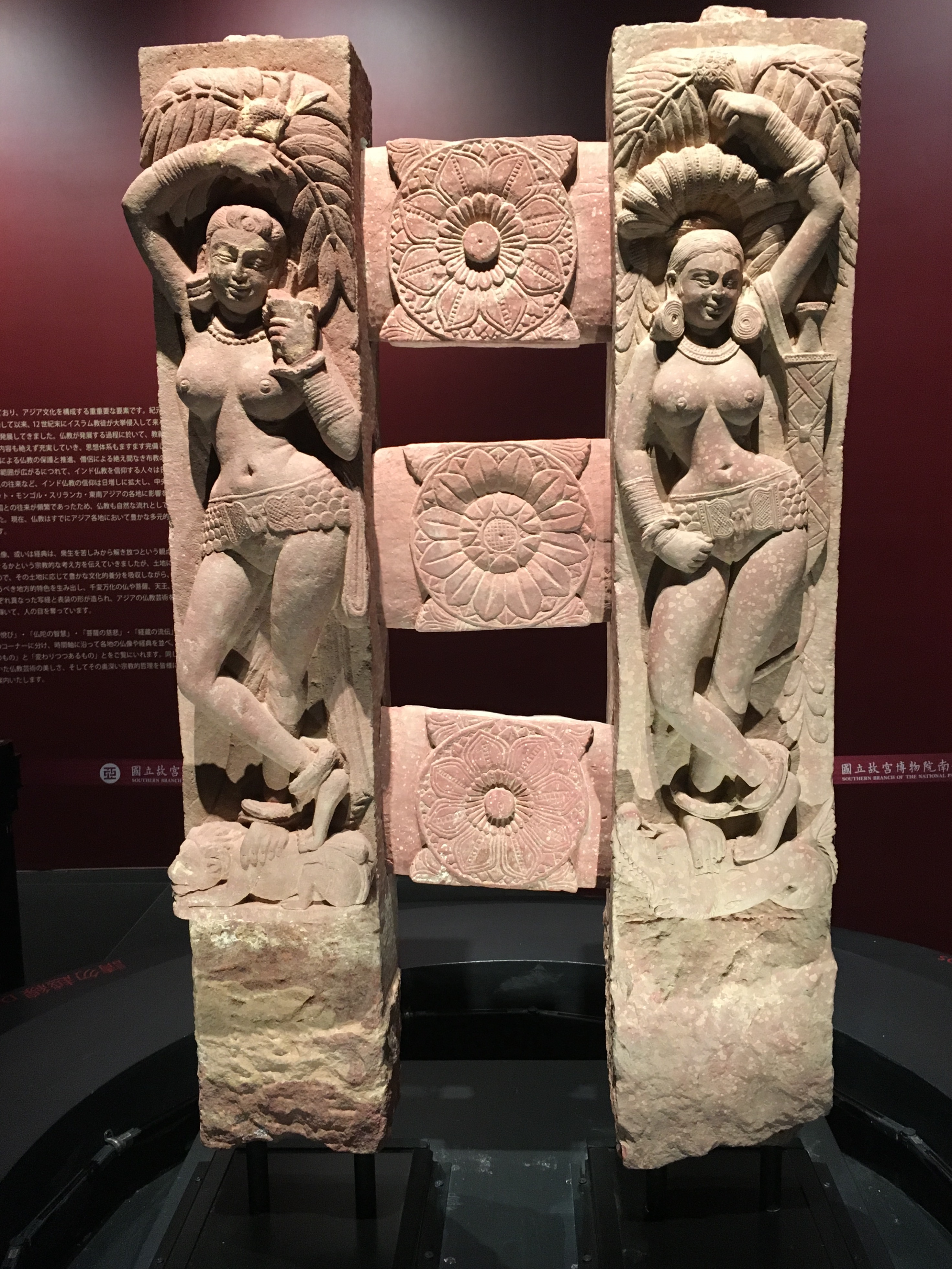 佛陀形影－院藏亞洲佛教藝術之美